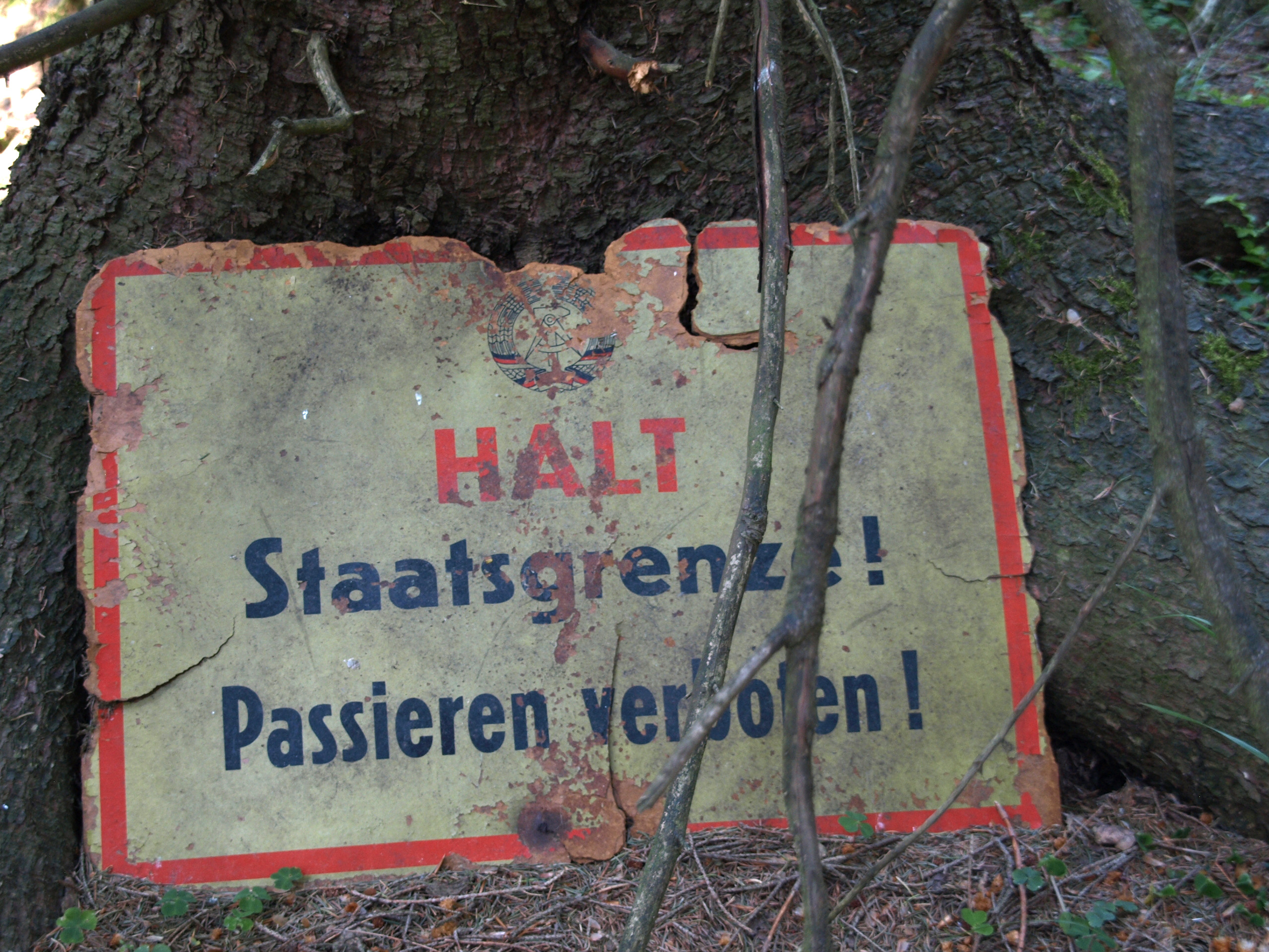 Im Wald verottendes Schild mit DDR-Wappen und der Inschrift: Halt Staatsgrenze! Passieren verboten!